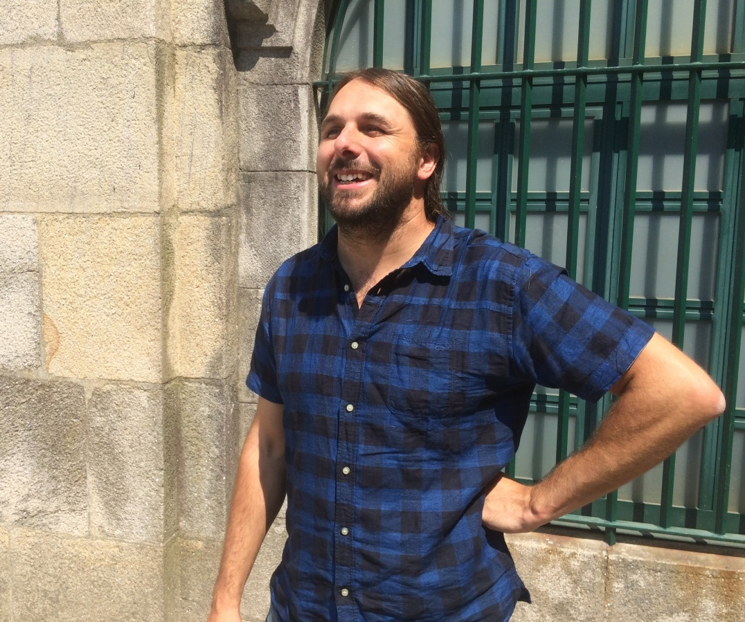 Xan Xove, músico galego e sindicalista da CGT.